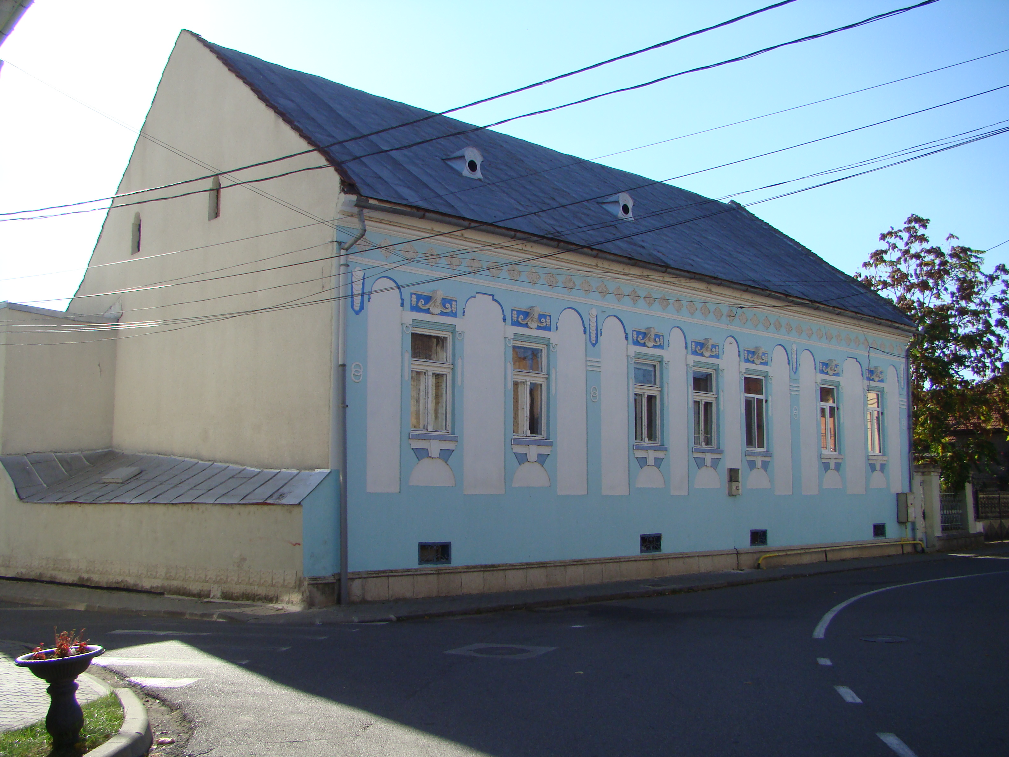 Ansamblul urban „Str. Libertății”, oraș Hațeg Str. Libertății 5-19; 6-20 sec. XIX - XX 02